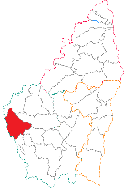 Situation du canton dans le département de l'Ardèche (France)